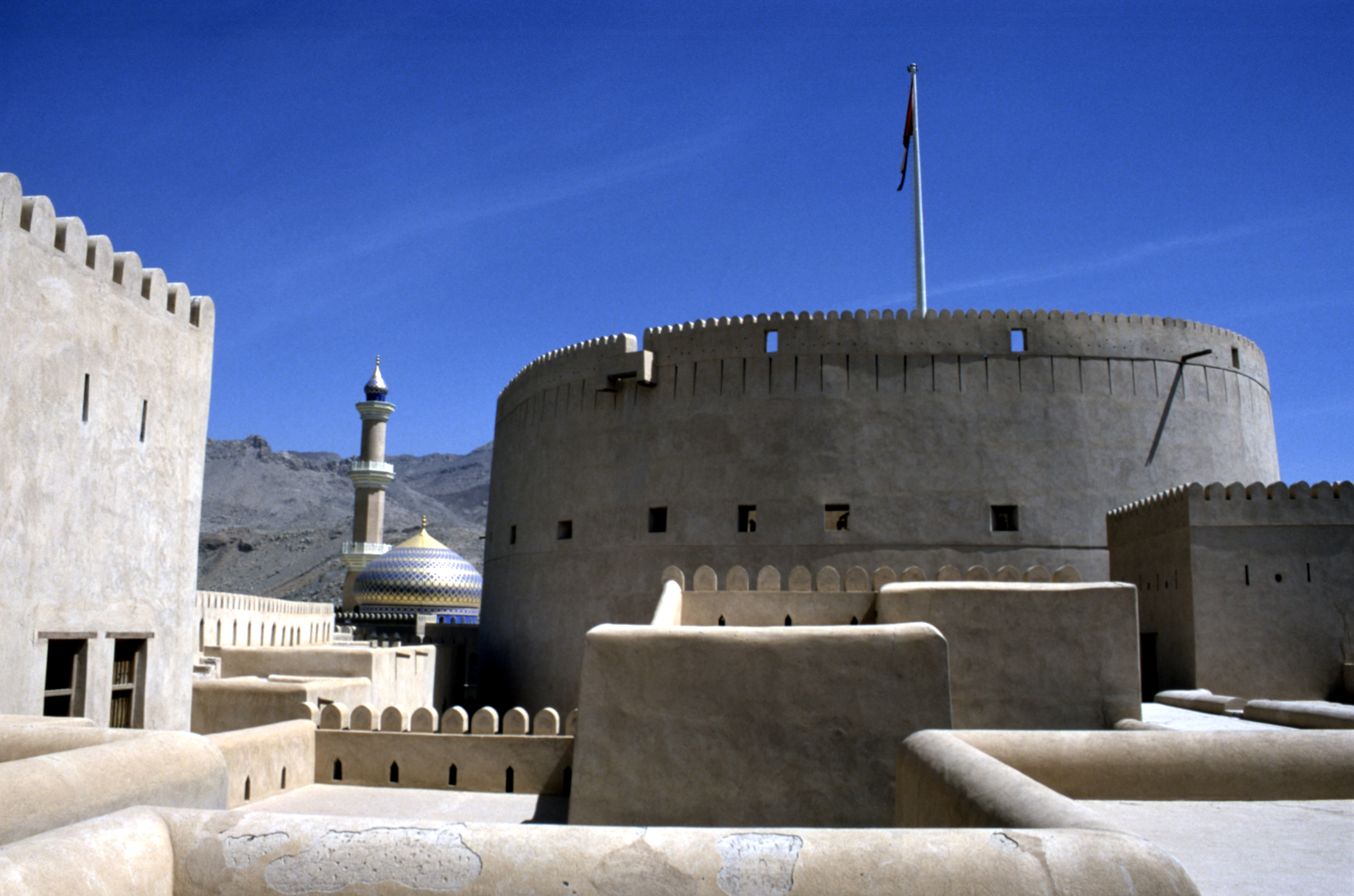 Oman im Februar 2001.